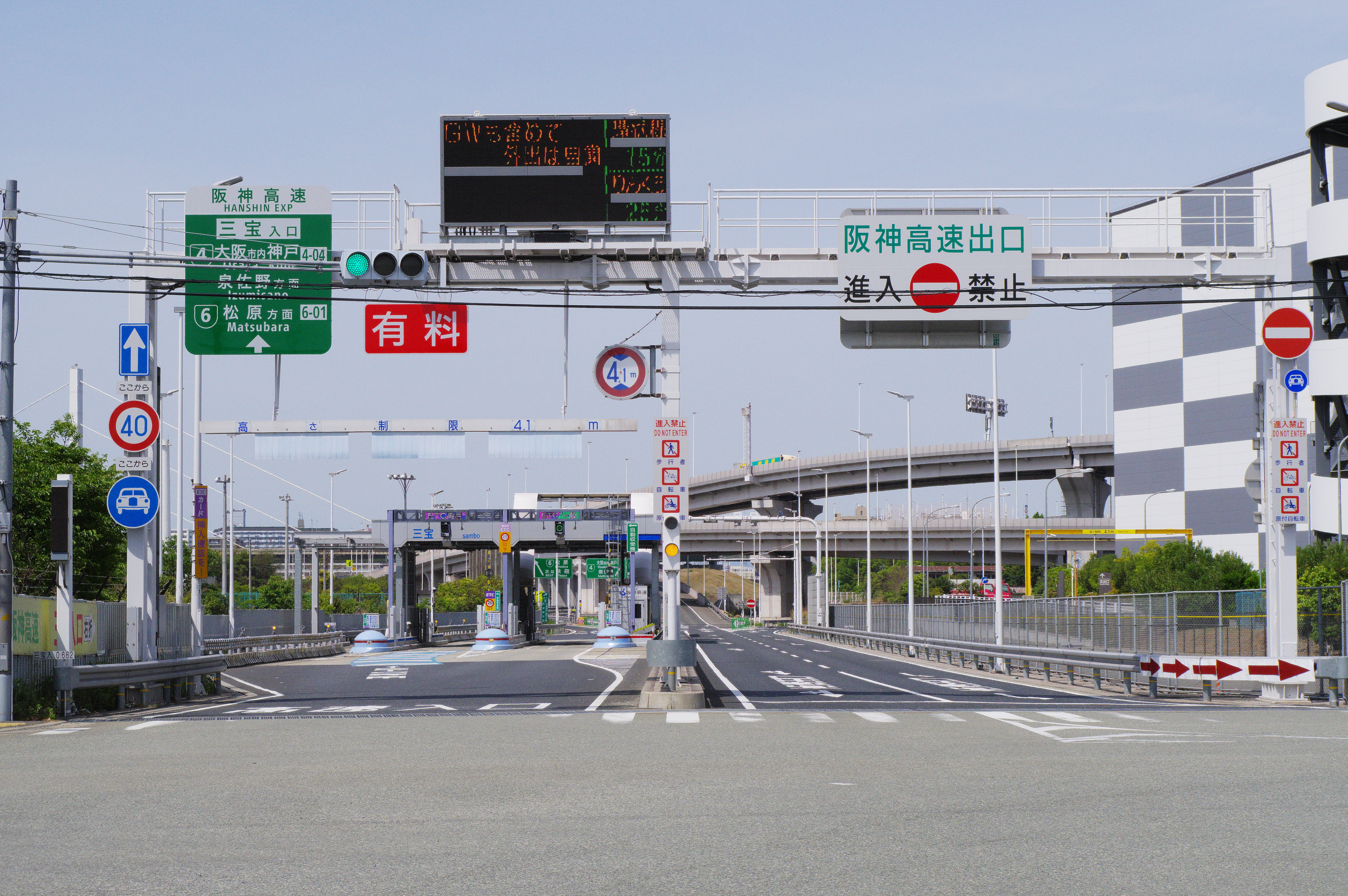 阪神高速道路4号湾岸線 6号大和川線 三宝出入口 大阪府堺市堺区築港八幡町